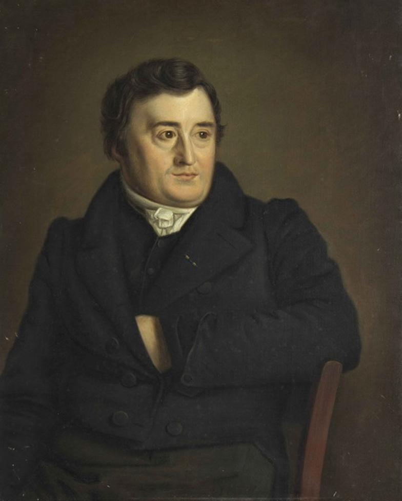 Portret fan mr. Arent van Halmael (1788-1850)